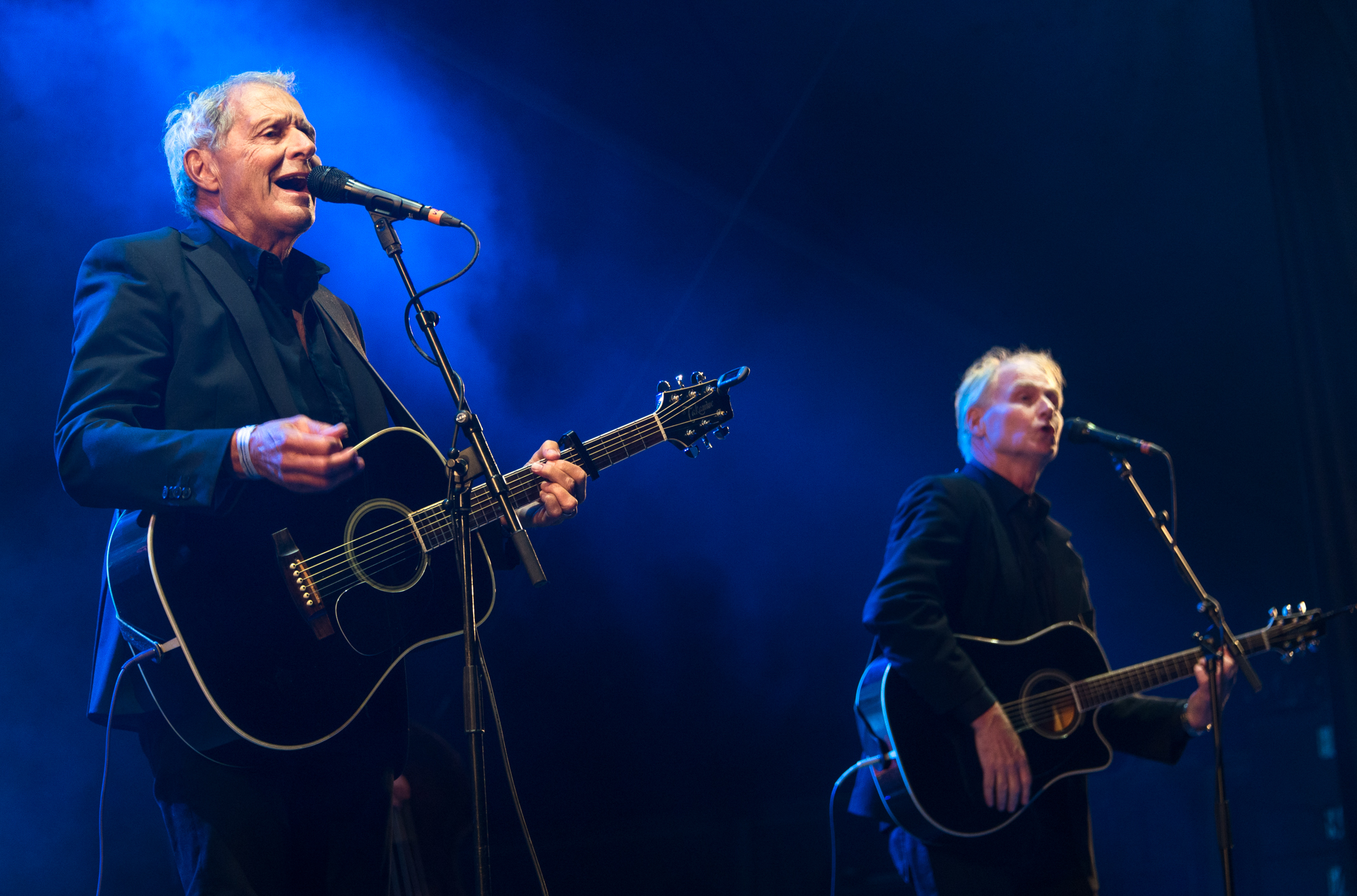 Adolphson & Falk uppträder på Gustav Adolfs torg på Stockholms Kulturfestival 2019.